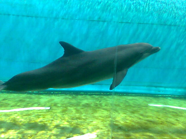 Delfino all'Acquario di Genova